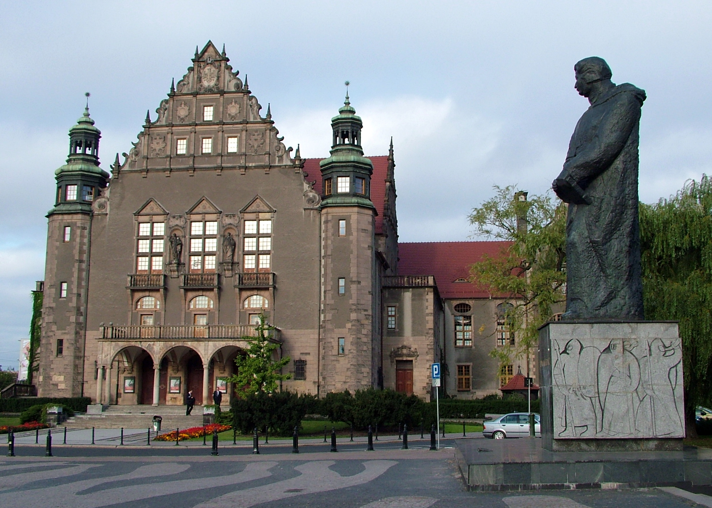 Poznan, Aula UAM und Mickiewicz-Platz.